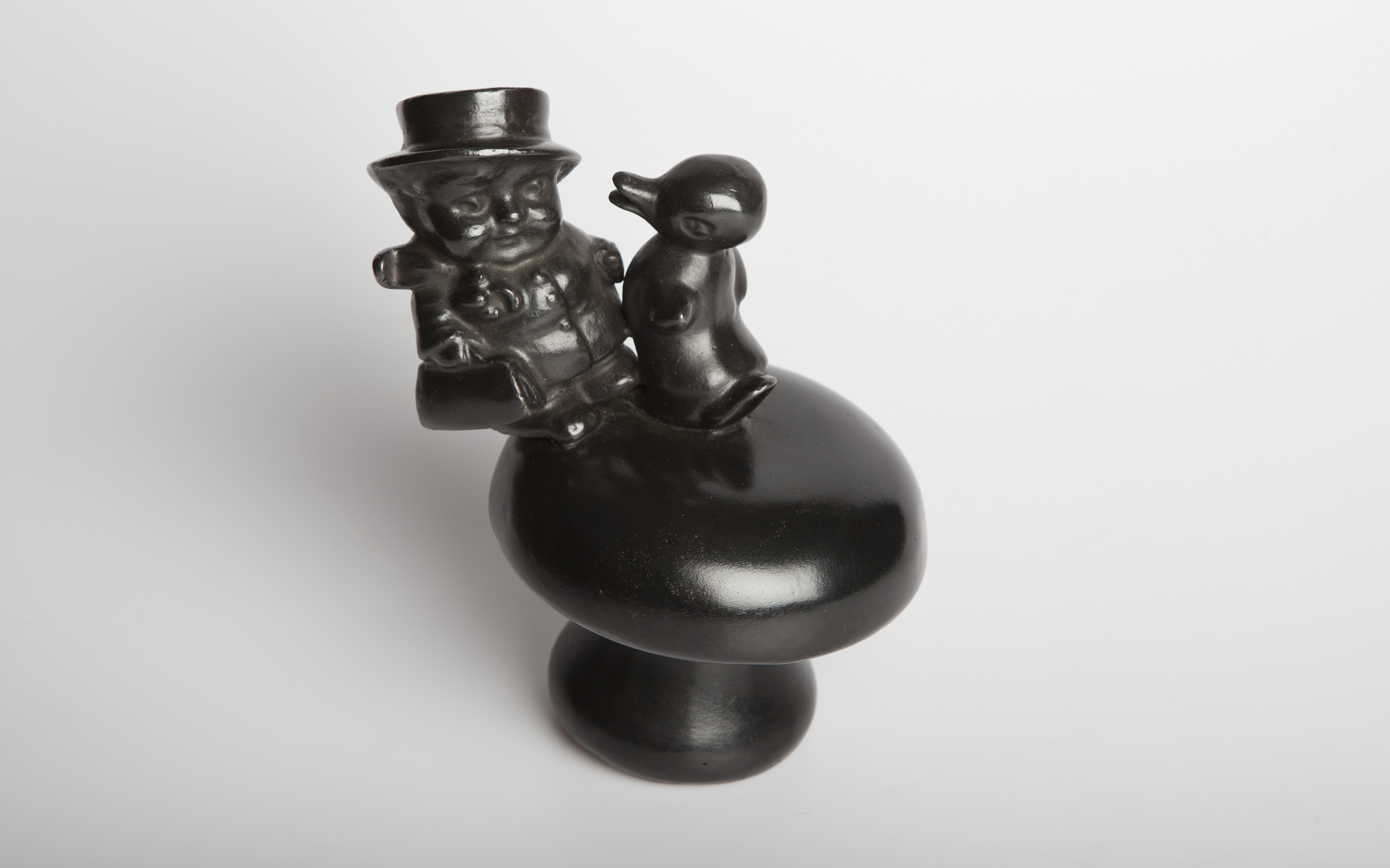 Expressens satirpris "Ankan". Foto: Kristoffer Wikström/Expressen